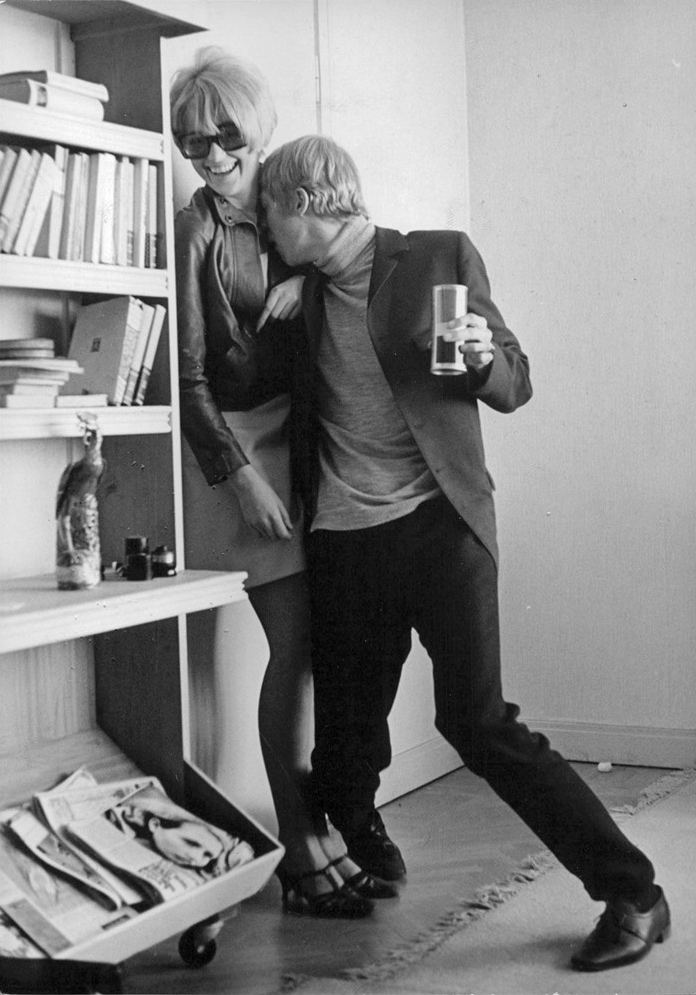 "Livet är stenkul". På vår bild syns Mai Nielsen och Lars Hansson.